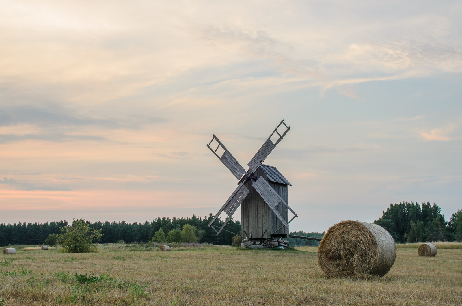 Tubala tuulik